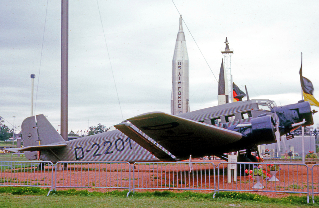 unkers Ju.52.3m in DLH marks as D-2201 at Munich in 1965